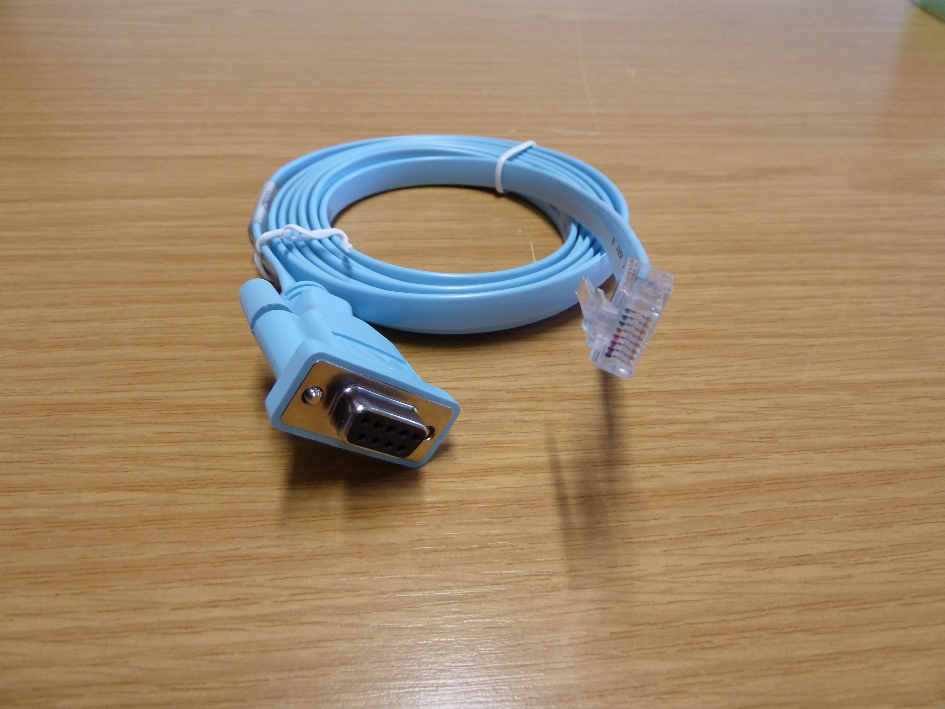 Cisco Konsolenkabel